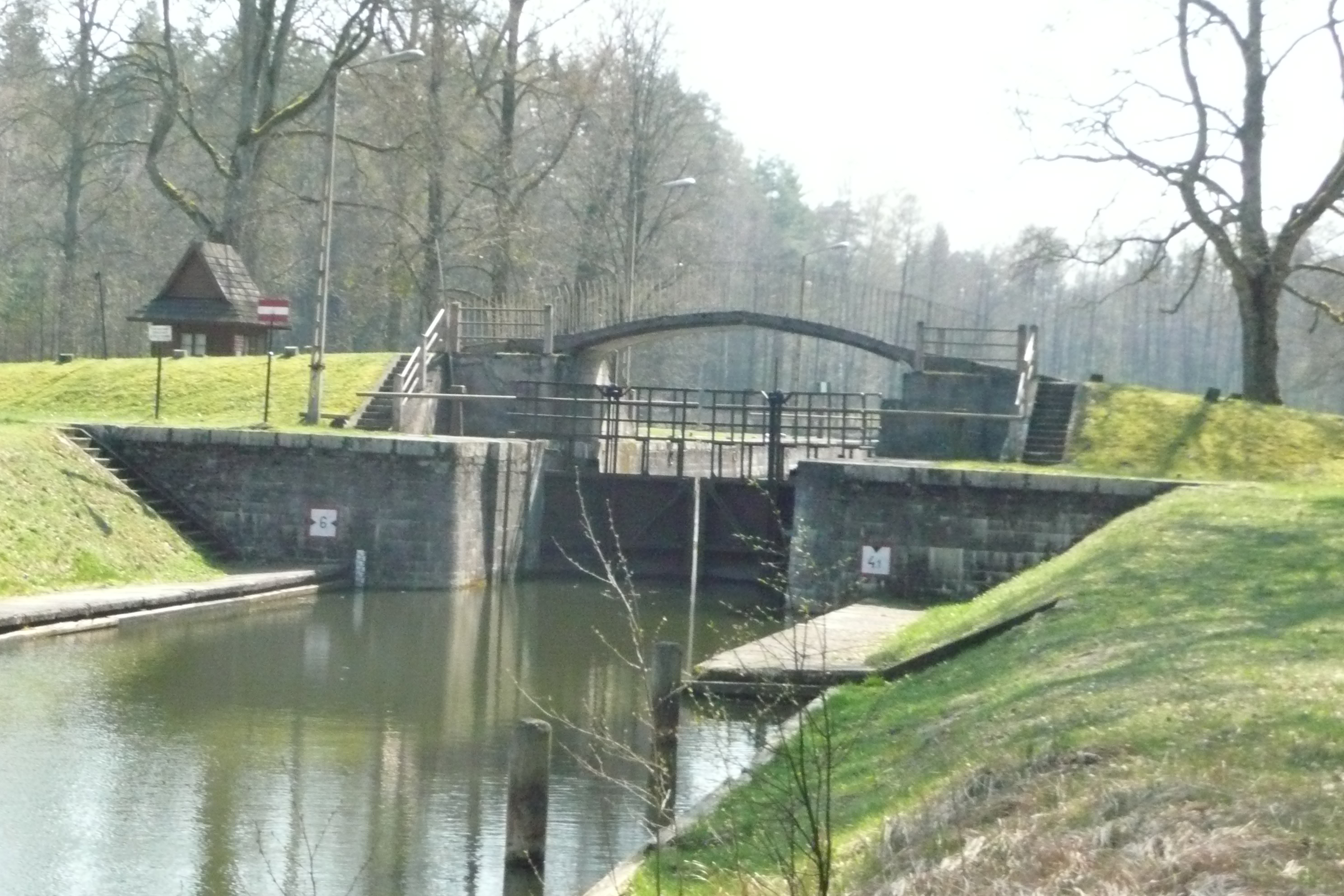 Widok na dolne wrota